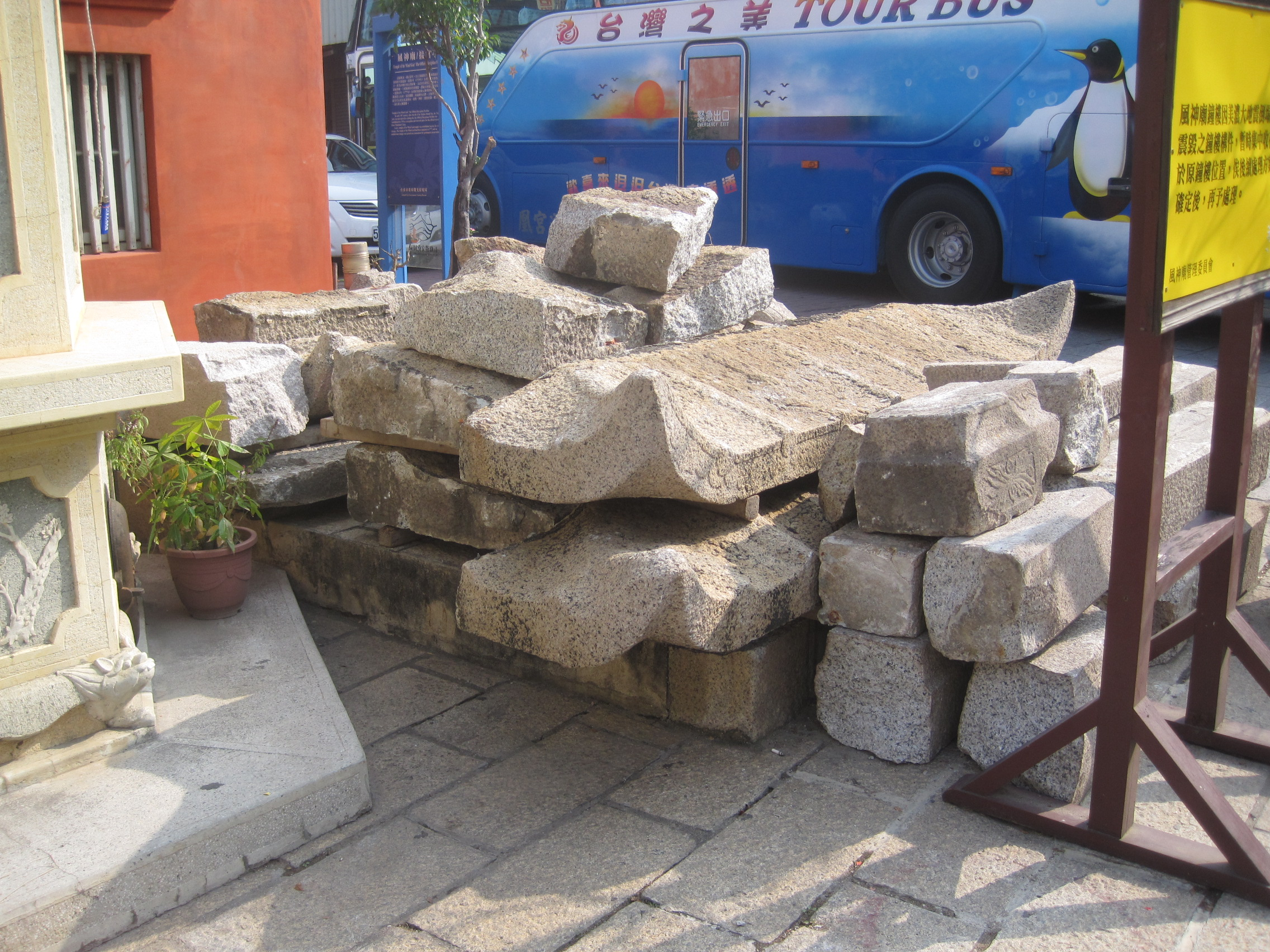 2016年因地震倒塌的風神廟鐘樓